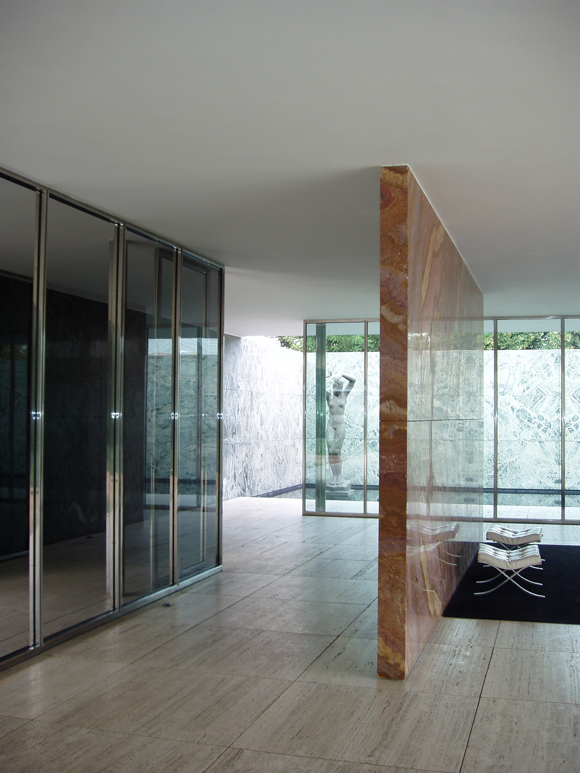 Pabellón de Alemania en la Exposición Universal de Barcelona 1929 (reconstruido). Arquitecto Ludwig Mies van der Rohe.